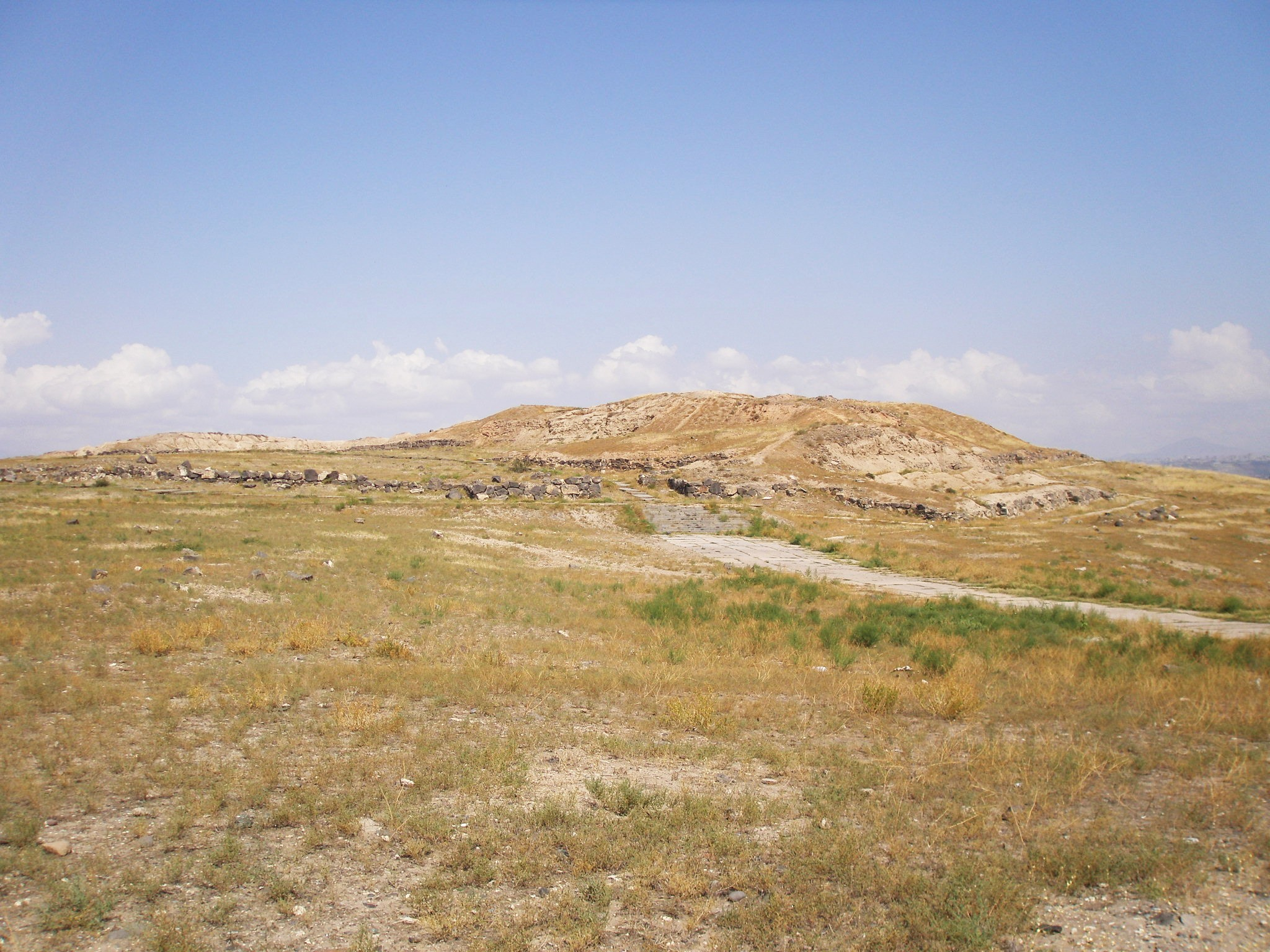 Karmir Blur Hill